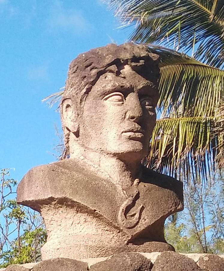 Estatua de Riro Kainga, último rey Rapa Nui, muerto en accidente en 1897